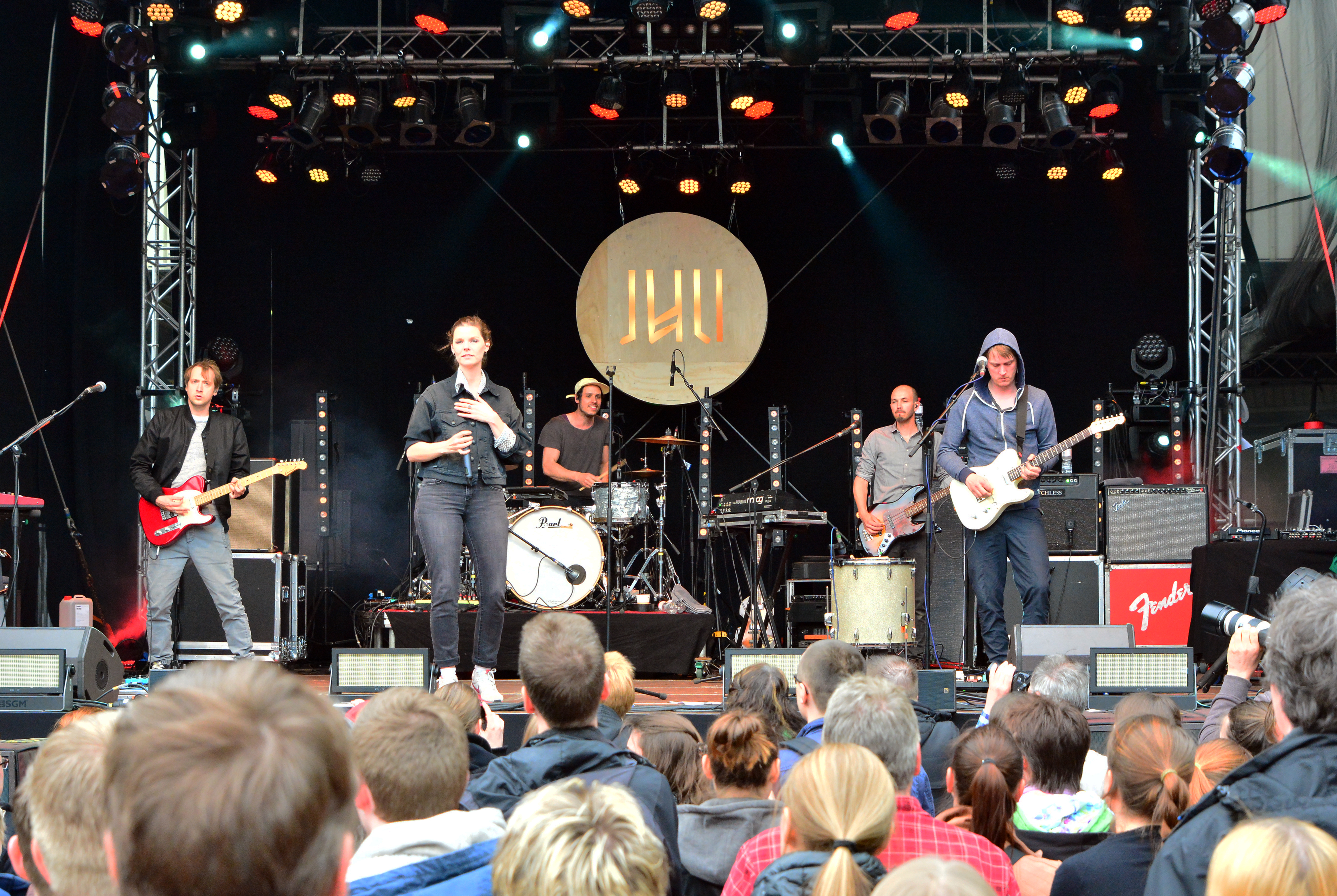 Juli beim „Holsten Brauereifest 2015“ in Hamburg